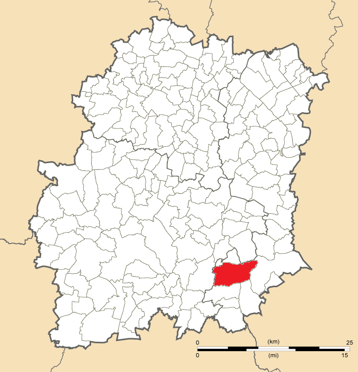 Carte de position de Maisse en Essonne (91)